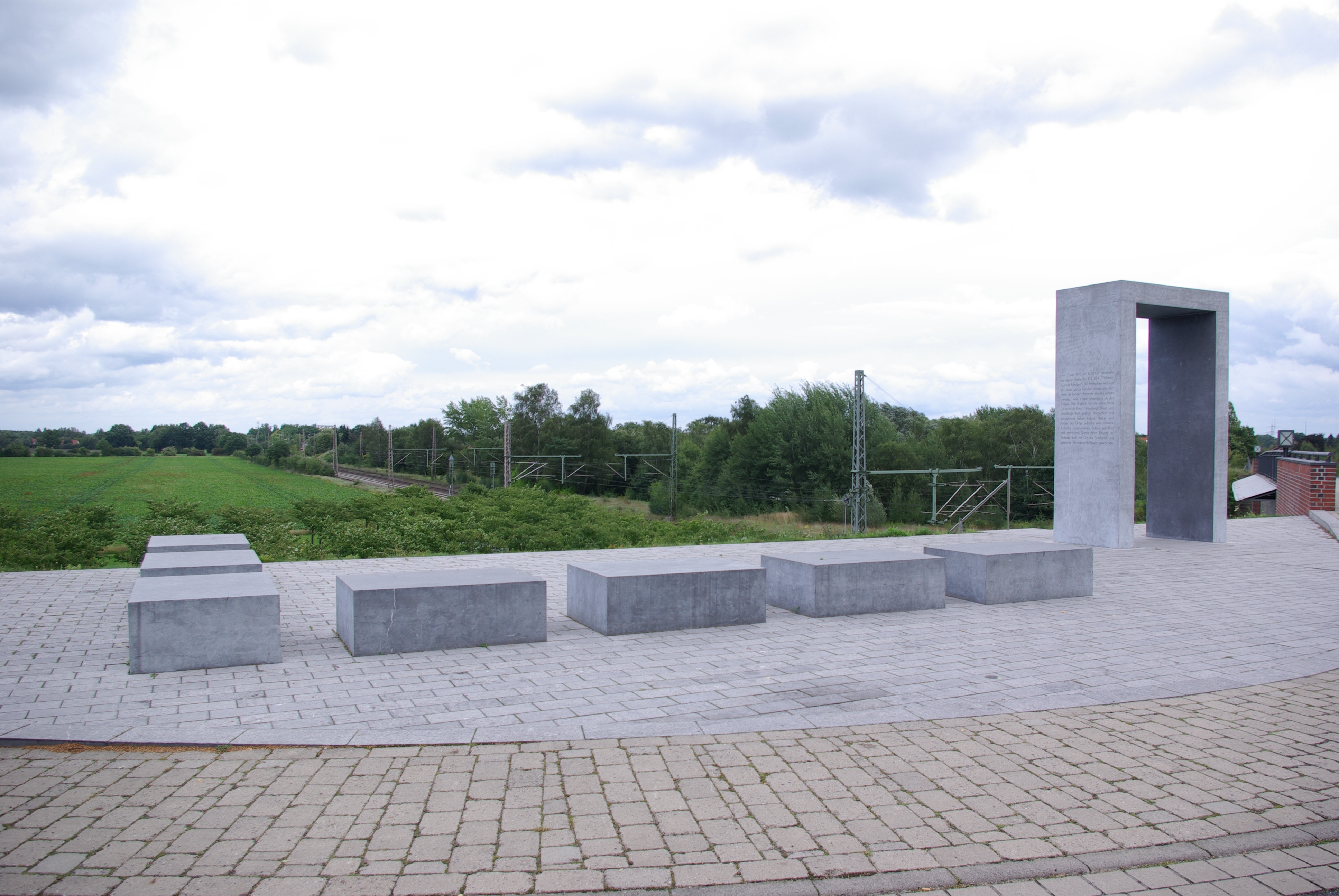 Eschede in Niedersachsen. Das Denkmal erinnert an das Bahnunglück 3. Juni 1998 bei dem 101 Menschen starben.